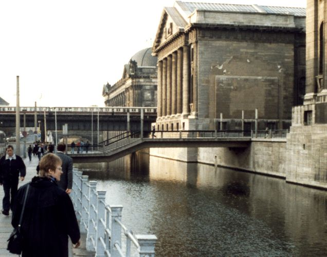 Museumsinsel in Berlin, de:1989 Rechts geht die Fußgängerbrücke zum Pergamonmuseum. Im Hintergrund durchquert ein S-Bahn-Zug auf der Berliner Stadtbahn das Bild. Dahinter sieht man das Bodemuseum mit seiner charakteristischen Kuppel